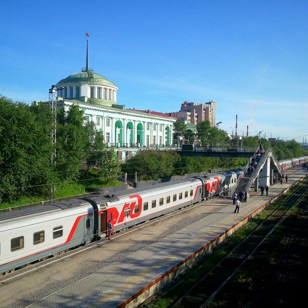 Август 2014